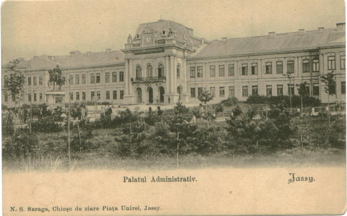 Statuia lui Ştefan cel Mare din Iaşi